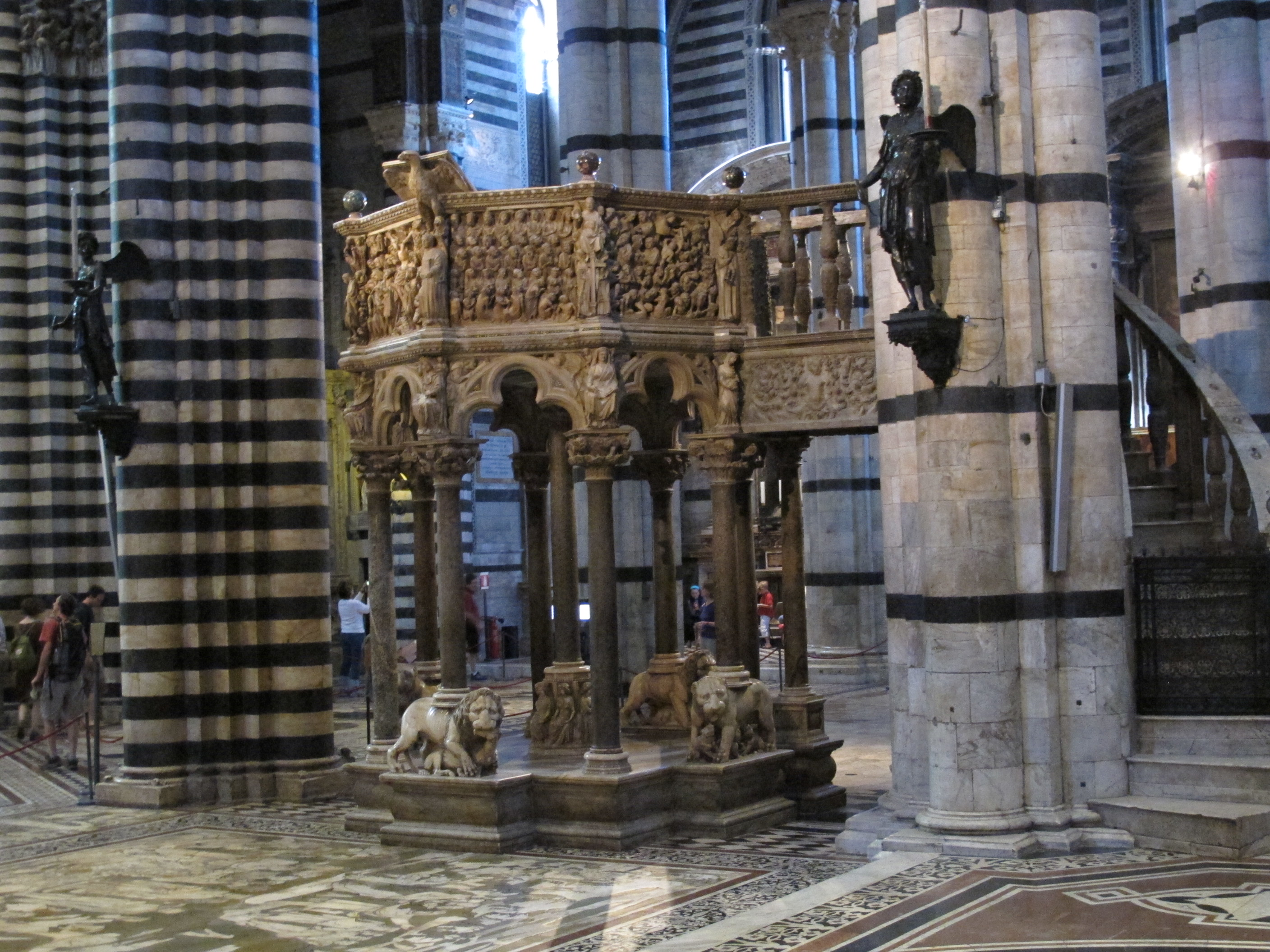 Pulpito del duomo di siena